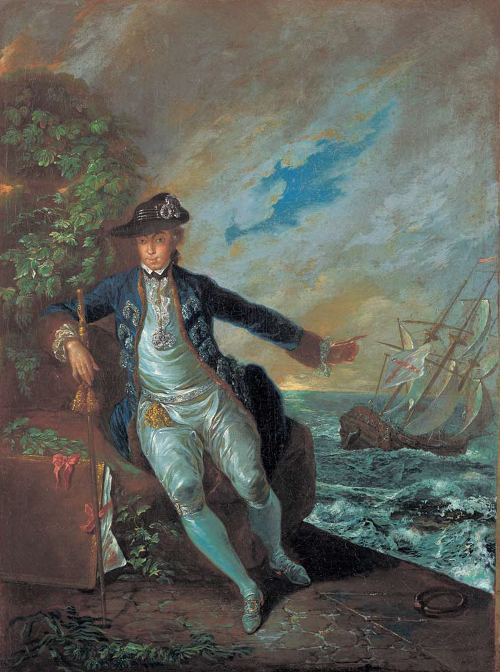 Luis Paret y Alcázar, Autorretrato